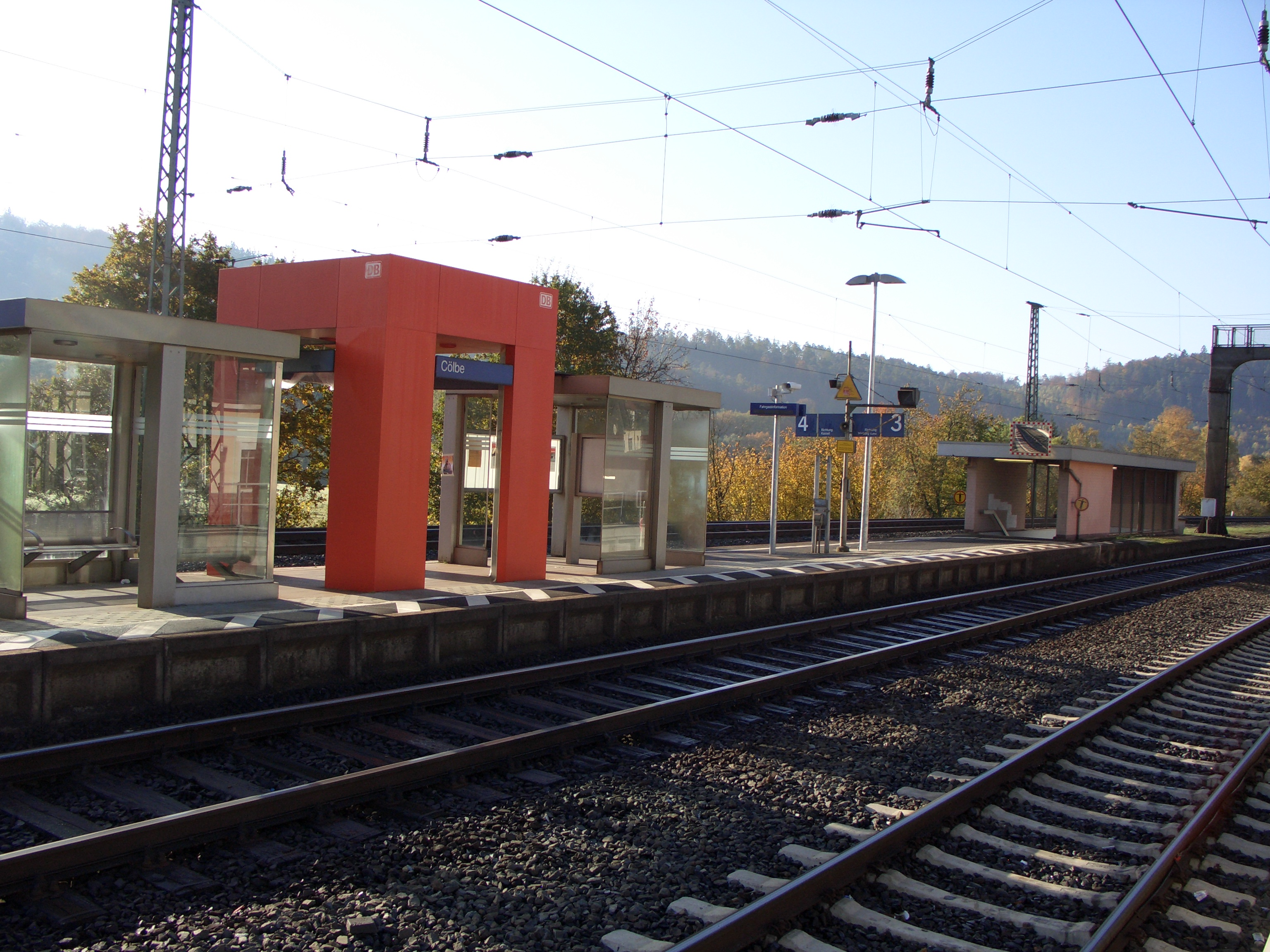 Der Bahnsteig der Gleise 3 und 4. Links sind die Wartehäuschen zu sehen, rechts der Auf- bzw. Abgang der Unterführung. Dazwischen stehen die Gleisschilder mit Fahrtrichtung und ein modernes Fahrgastinformationssystem.